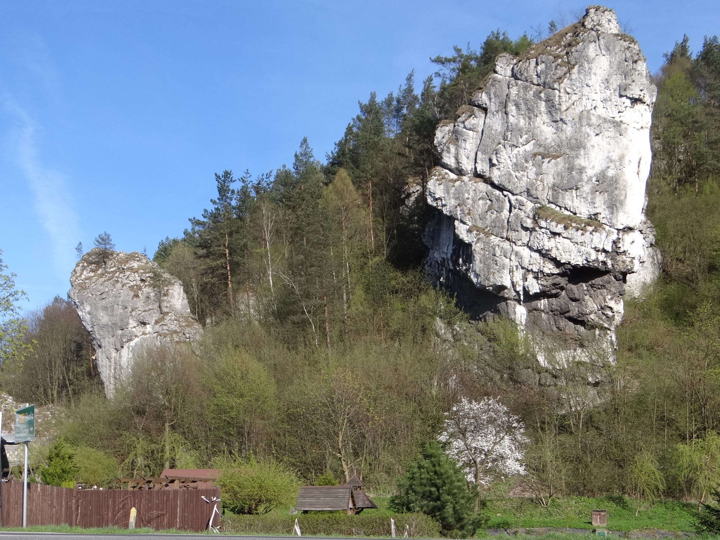 Skały Pochylce w Ojcowskim Parku Narodowym